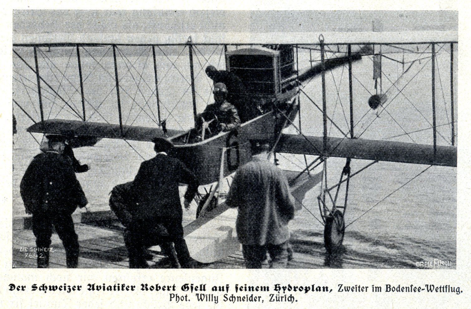 Robert Gsell auf seinem Hydroplan, Zweiter im Bodensee-Wettflug